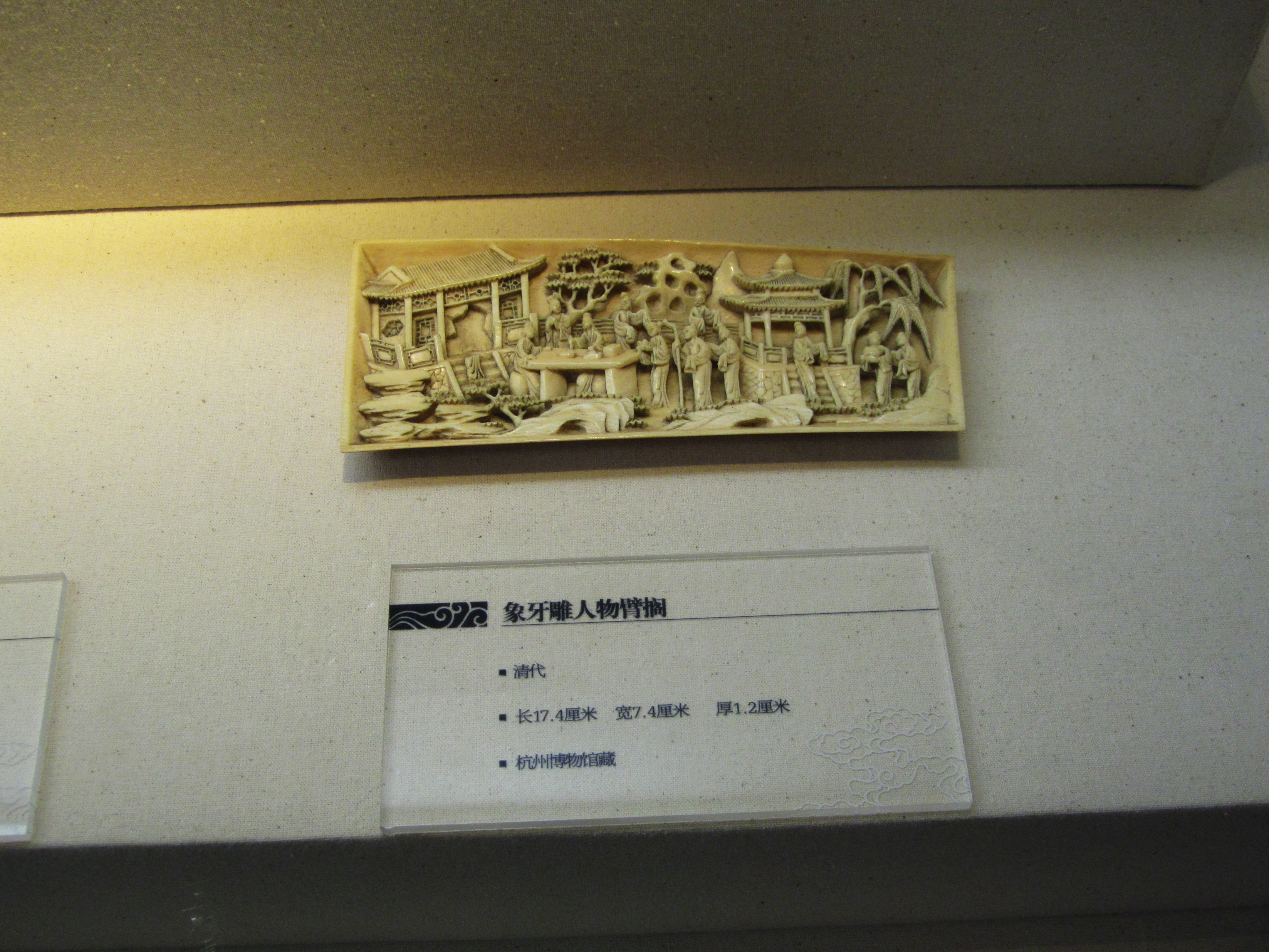 清代象牙雕人物臂搁，长17.4厘米，宽7.4厘米，厚1.2厘米，现藏杭州博物馆。